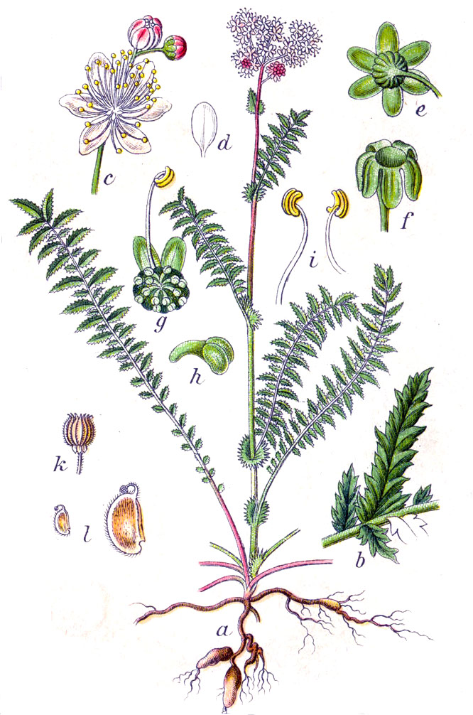 Filipendula vulgaris Moench, syn. Filipendula hexapetala Gilib. , nom. inval. (op. utique oppr.) Original Caption Filipendel, Filipendula hexapetala